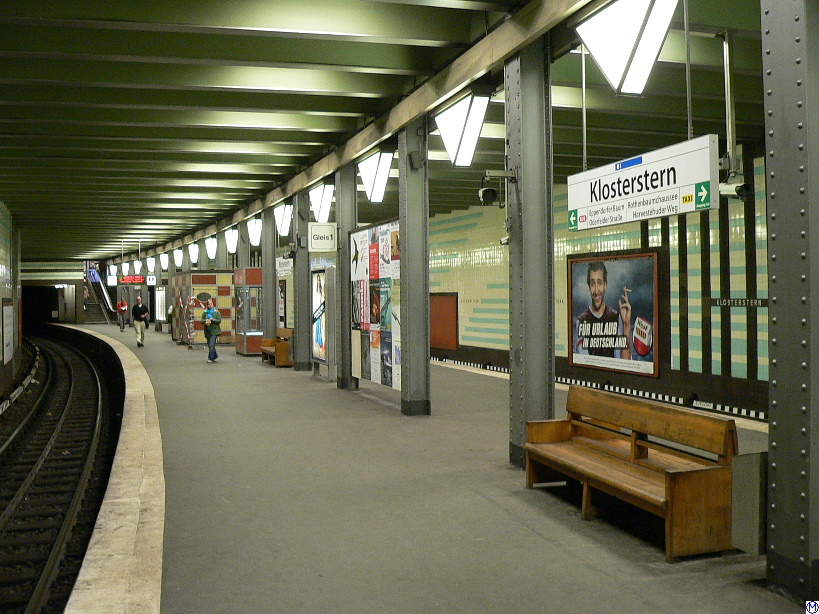 U-Bahnhof Klosterstern 1929-1930, nach Rückbau 1986 (28.4.2005) Architekt Walter Puritz